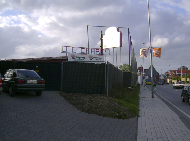 Entrada al campo de La Cruz en Ceares, Gijón